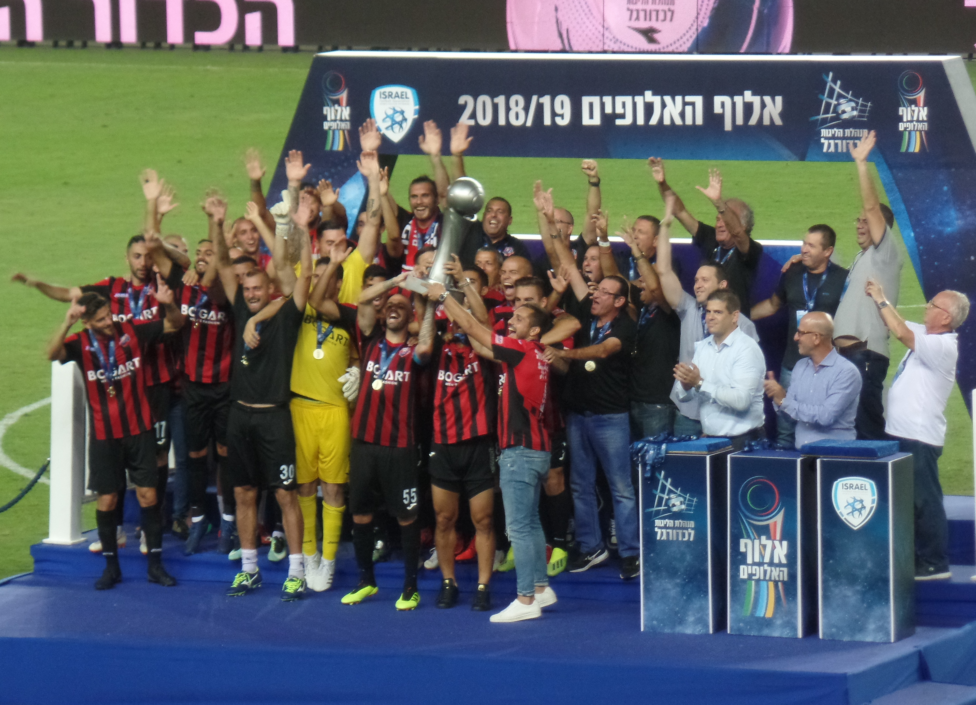 שחקני הפועל חיפה מניפים את גביע אלוף האלופים